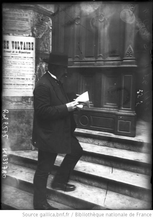 Émile Pataud devant une affiche concernant le lycée Voltaire à Paris, représentant syndical des électriciens, en procès, 9 septembre 1908 (photographie de presse / Agence Rol)